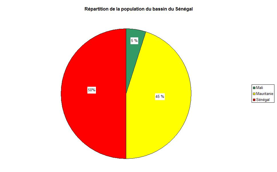 Répartition de la population du bassin du fleuve Sénégal entre les différents pays riverains